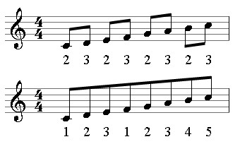 Gegenueberstellung eines historischen und eines modernen Fingersatzes.